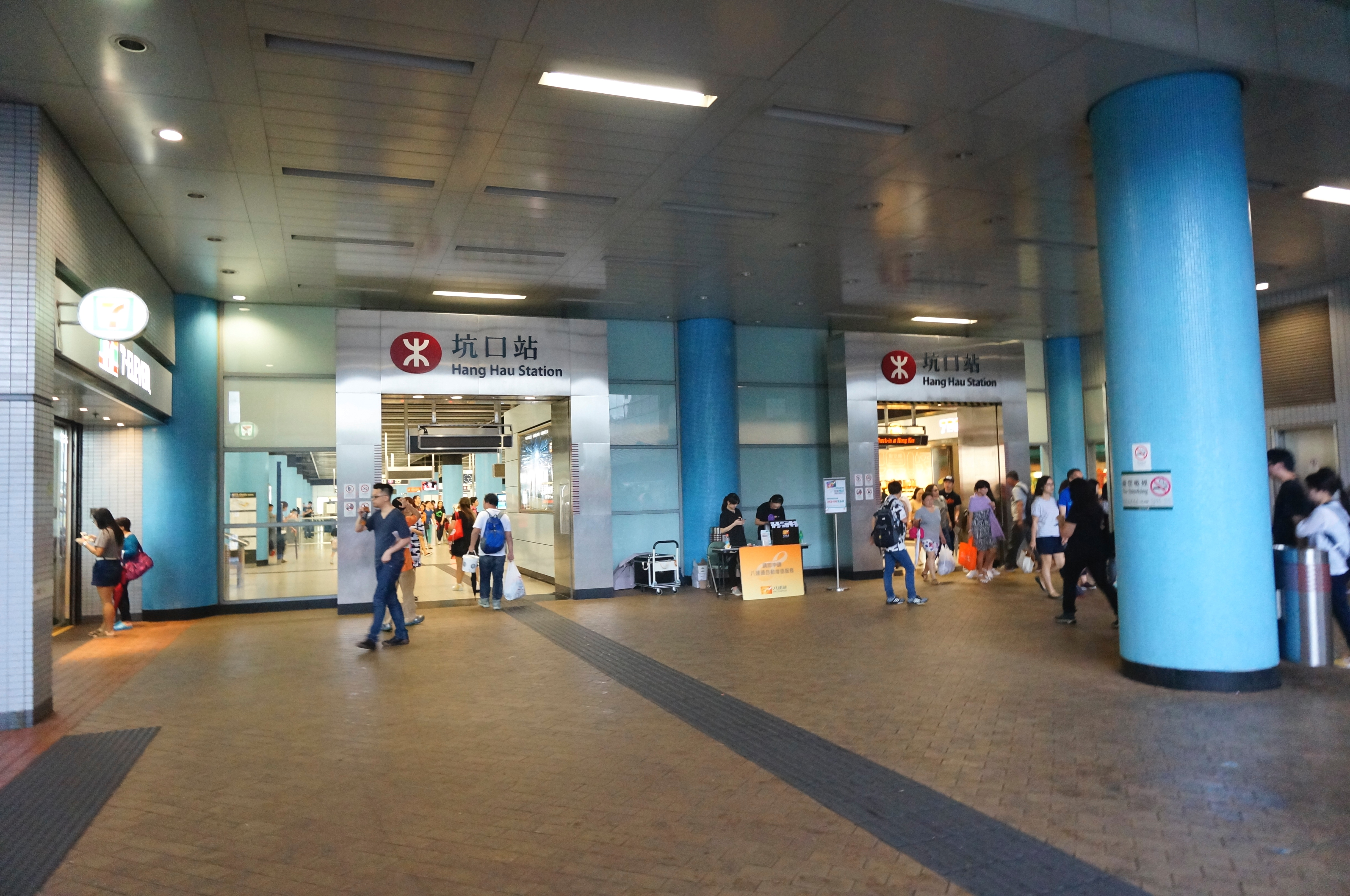 坑口站B出入口